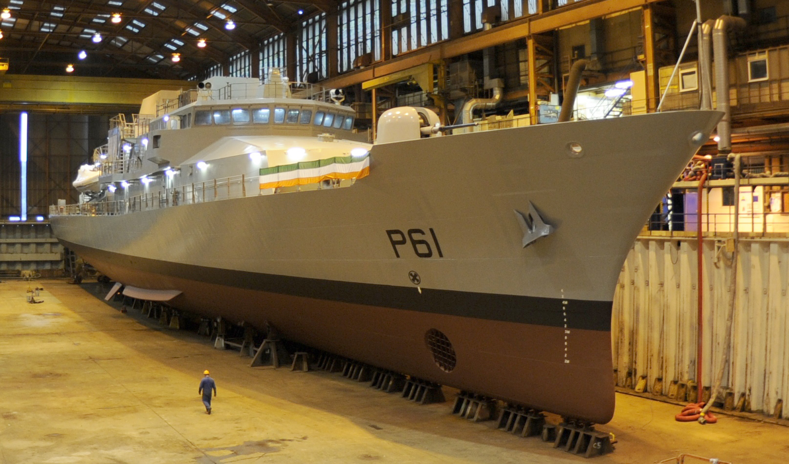 LE Samuel Beckett in Drydock